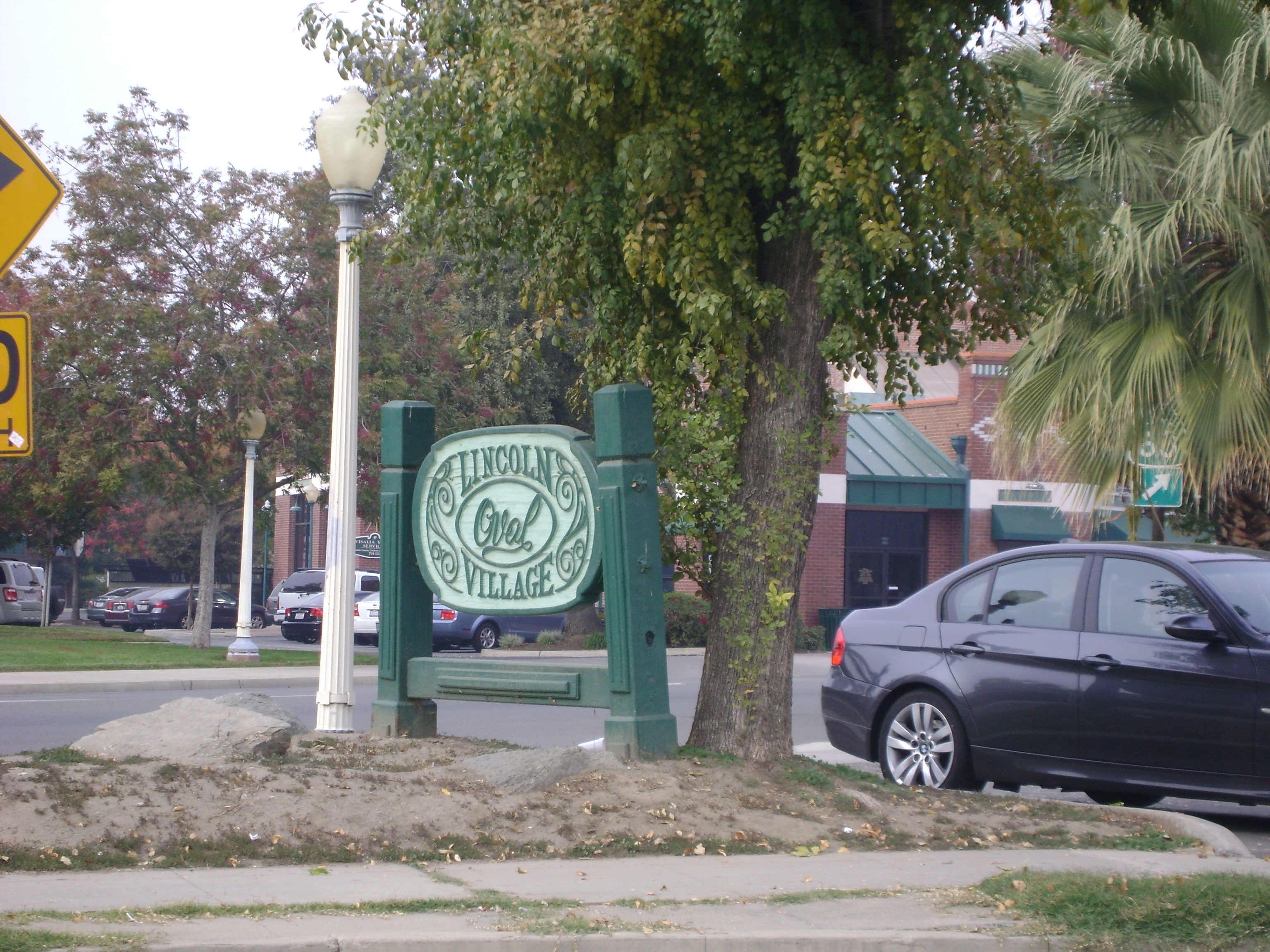 Lincoln Oval Village